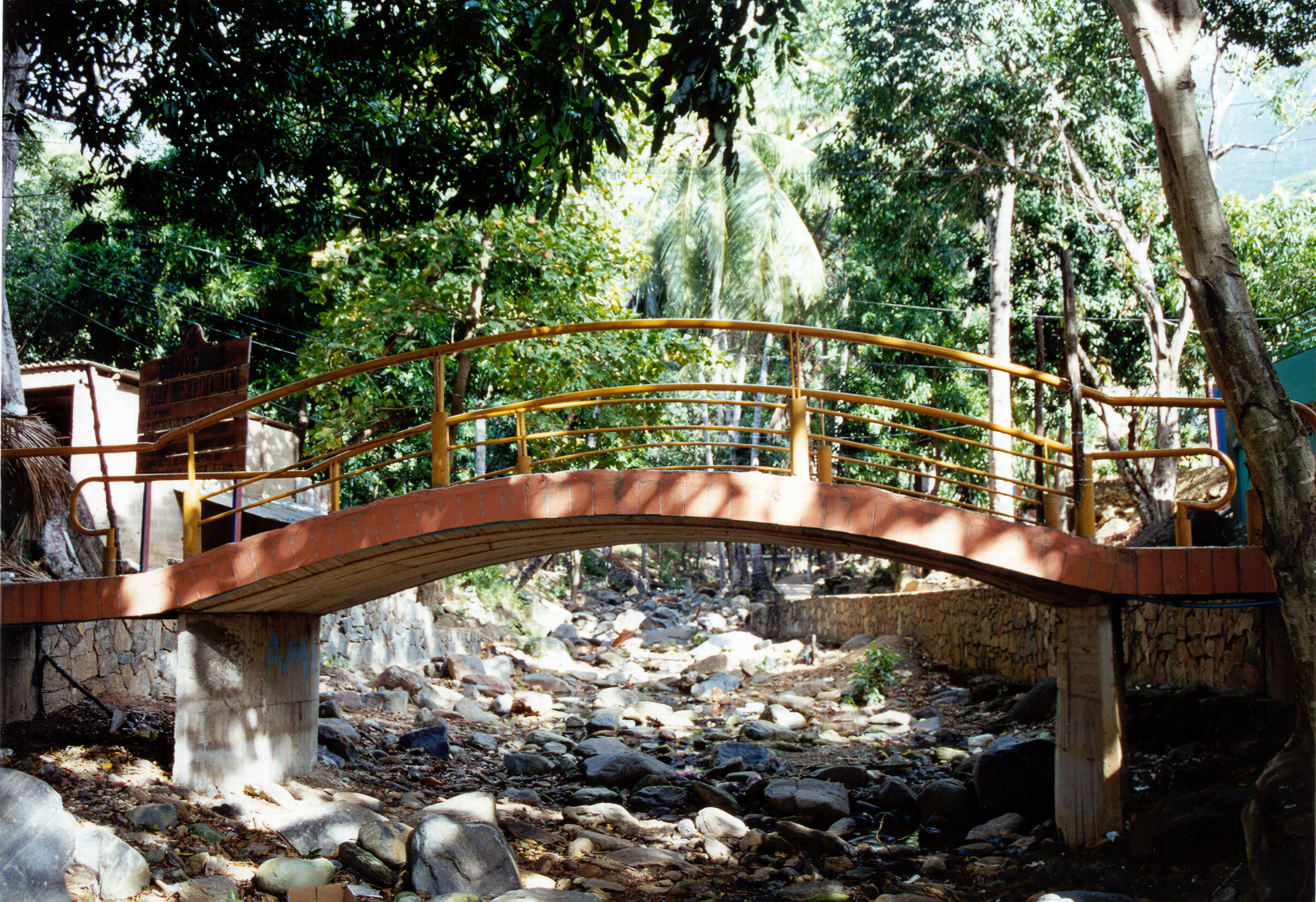 Puente camino a las posas de San Juan Bautista, cerro el Copey, Nueva Esparta, Venezuela.